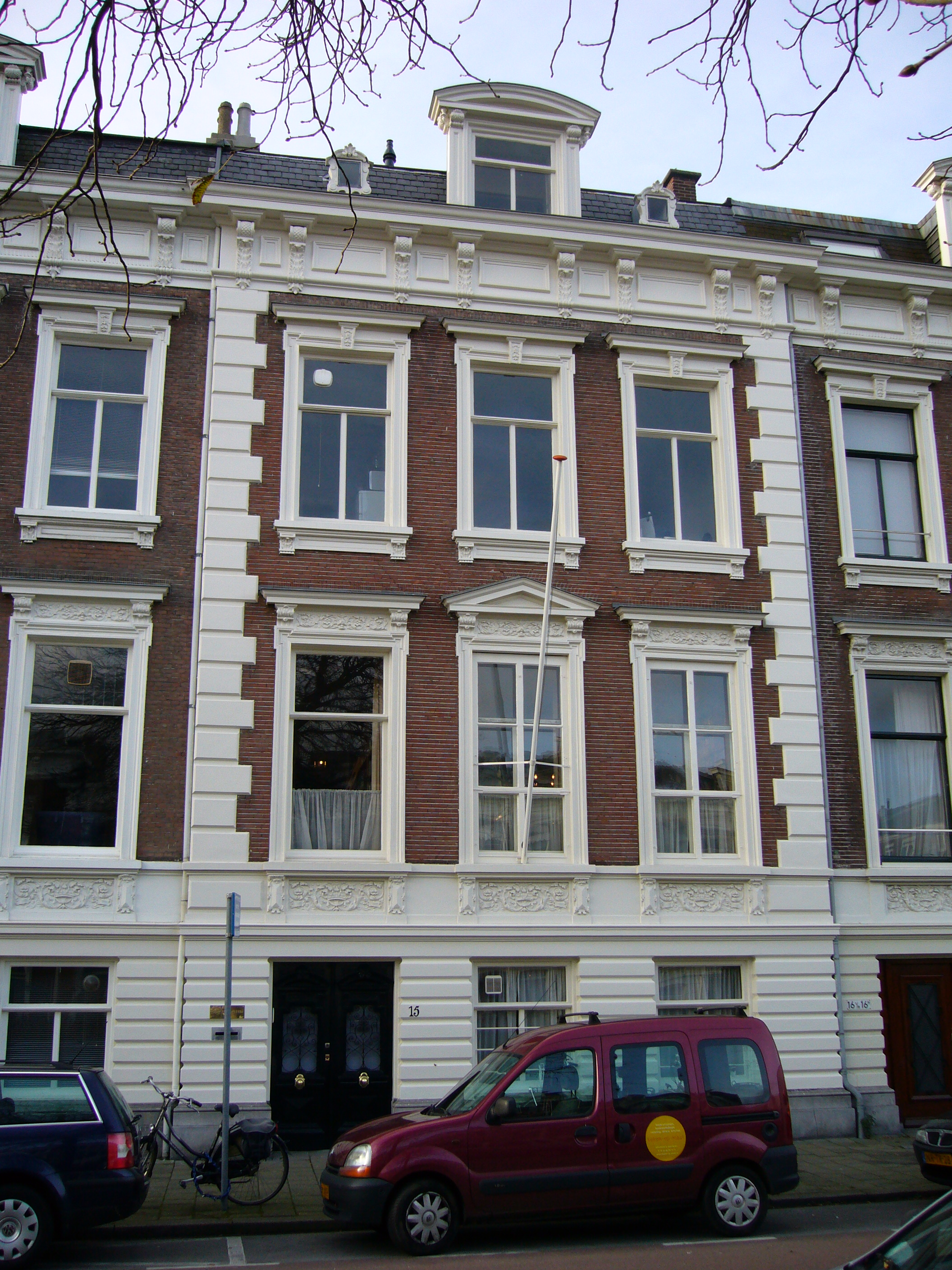 Damesleesmuseum in Den Haag, gevel